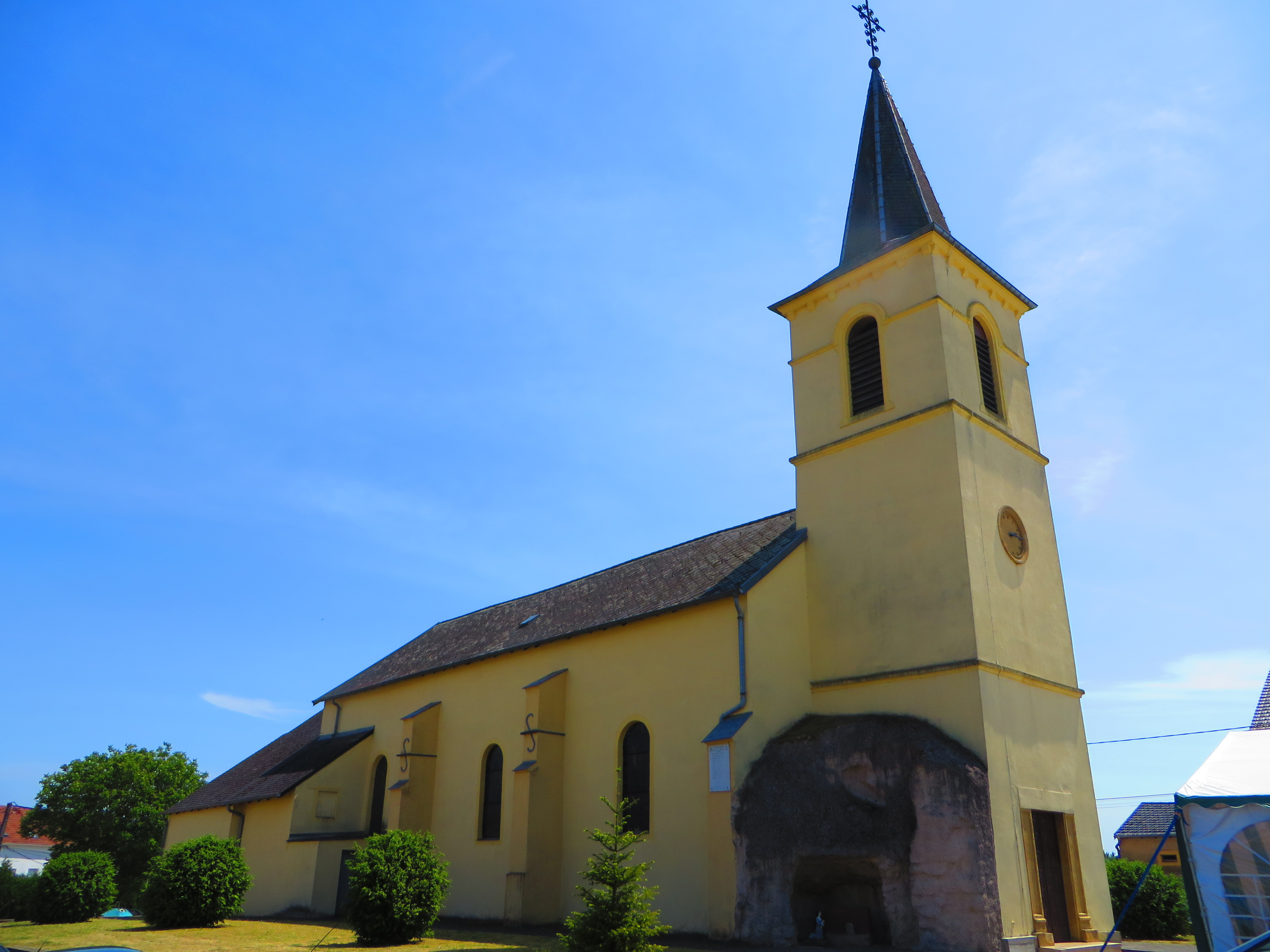 Laumesfeld eglise